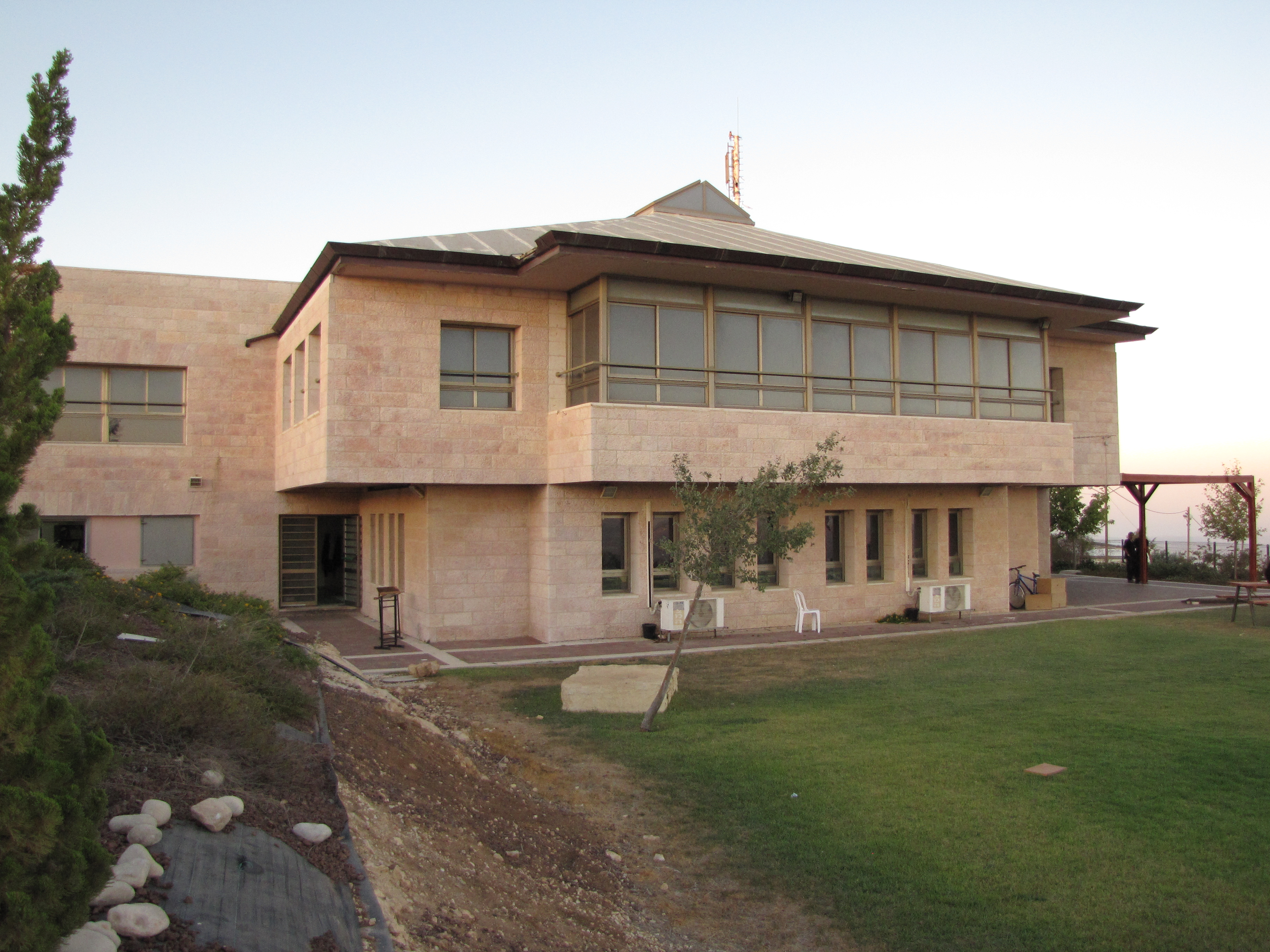 הבניין של ישיבת מעלה חבר